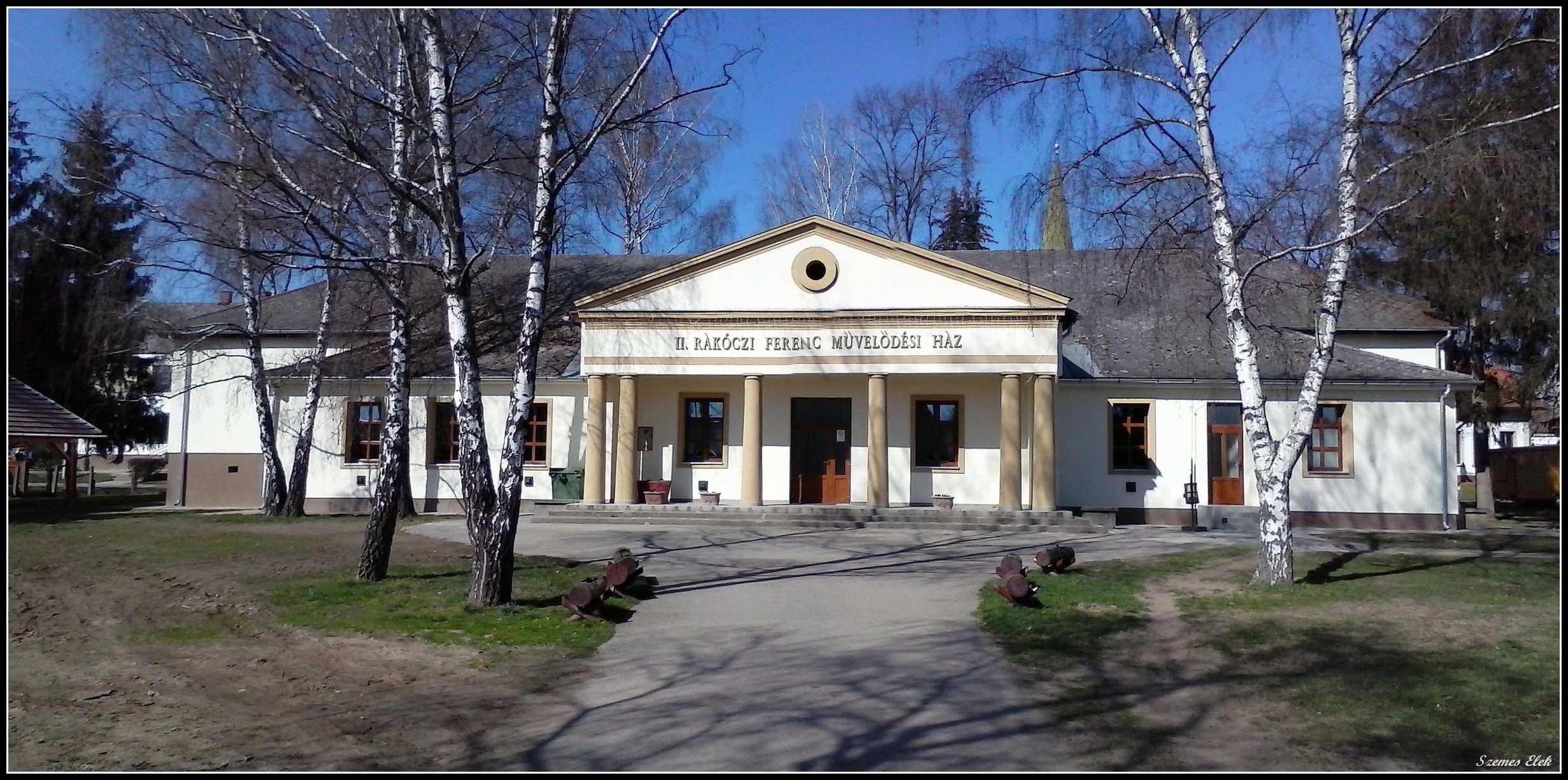 II. Rákóczi Ferenc Művelődési Ház és Könyvtár, Cím: Tarpa, Kossuth utca 21/c